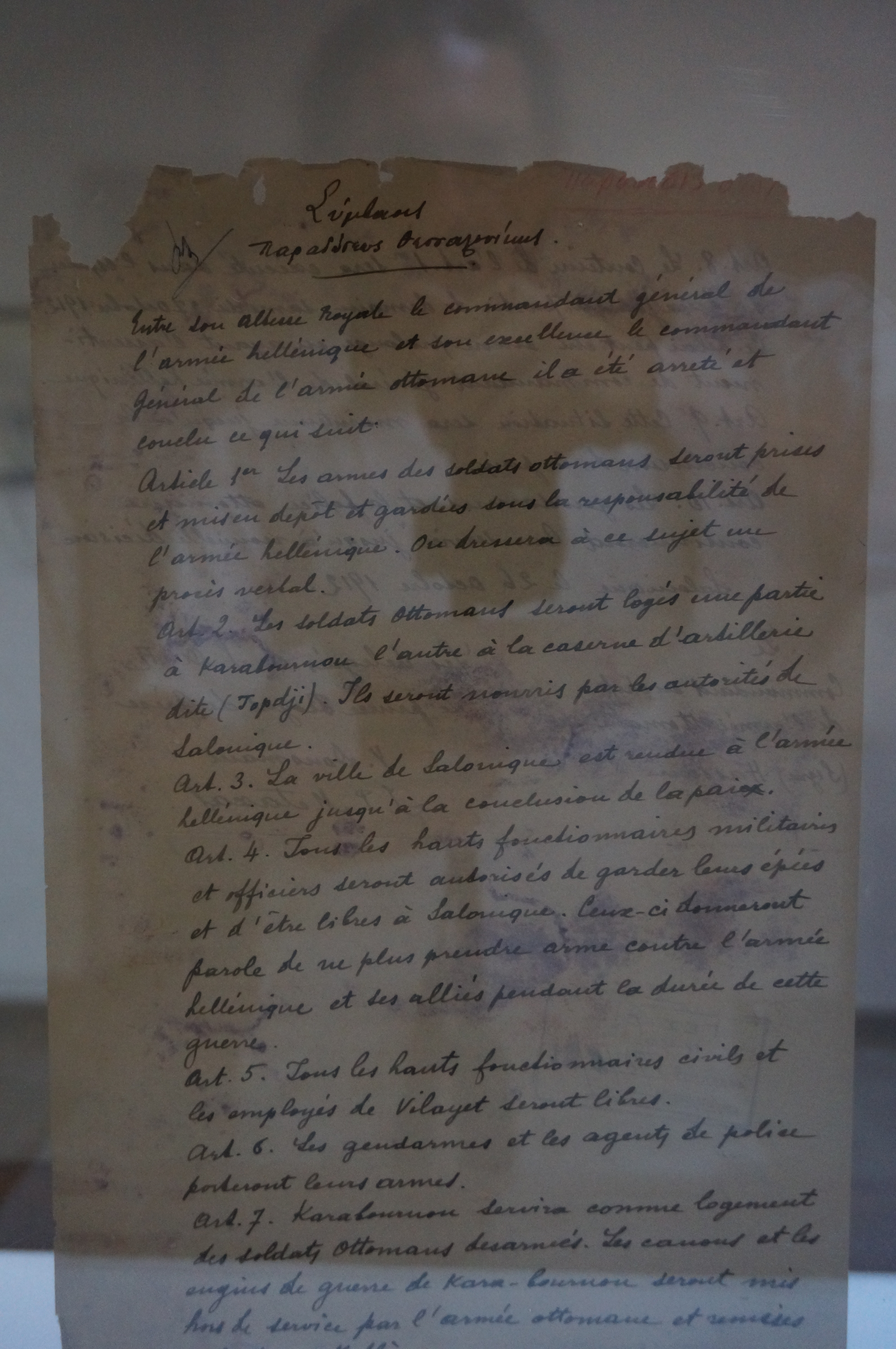 visible au Thessaloniki War Museum.